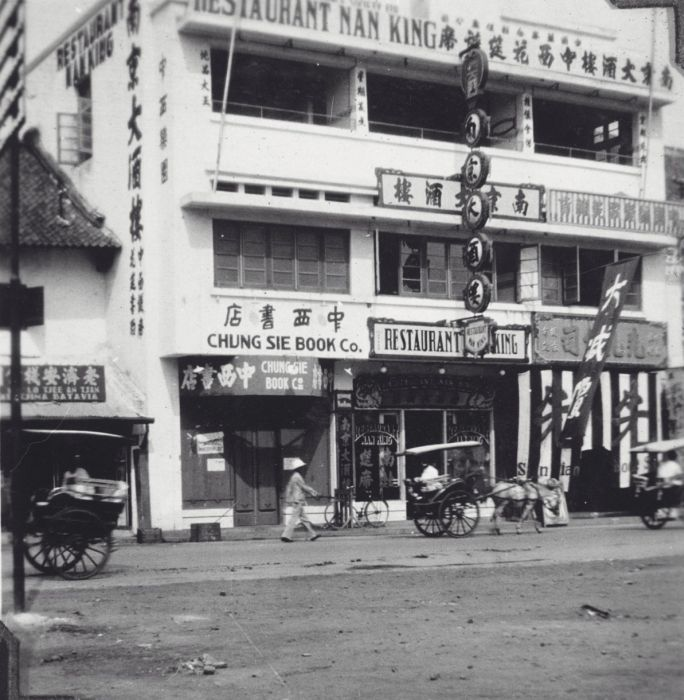 foto. Restaurant Nan King in de Chinese wijk, Batavia